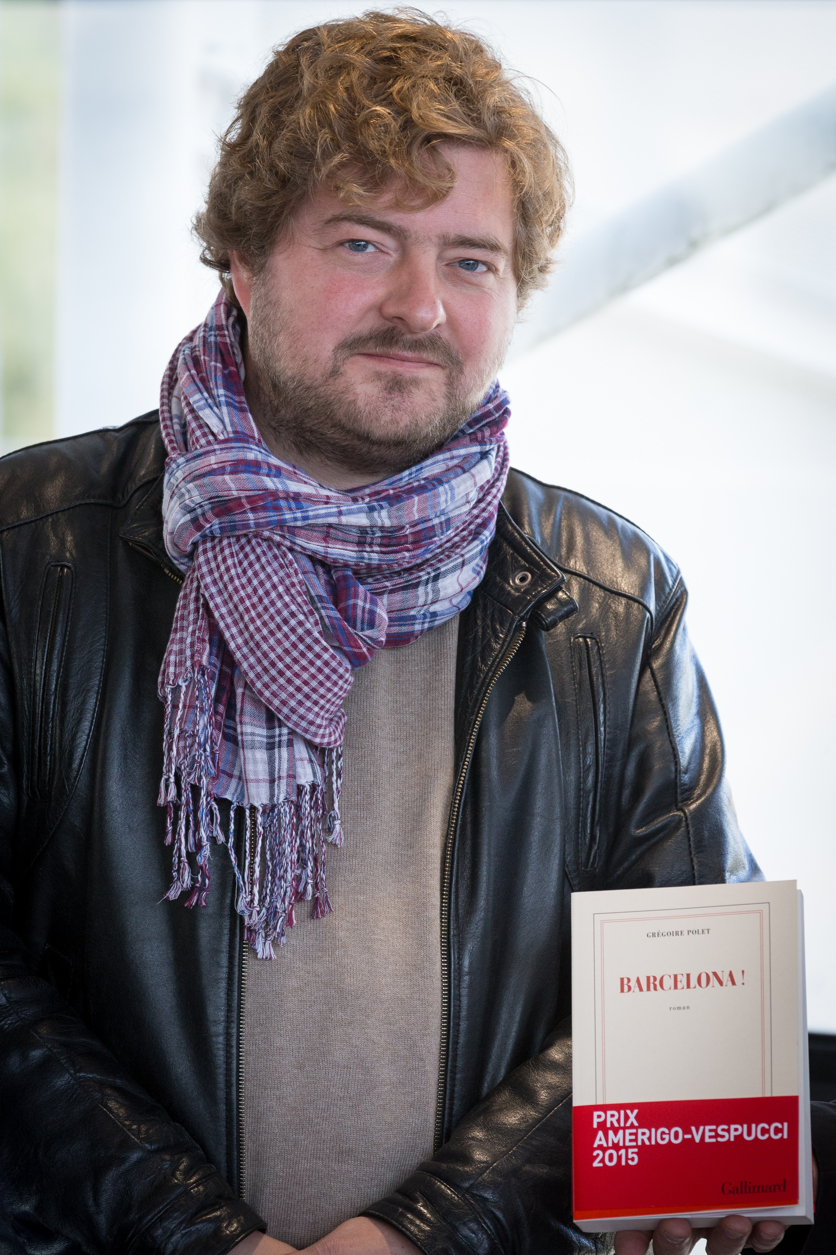 Grégoire Polet recevant le prix Amerigo-Vespucci lors du Festival international de géographie 2015.